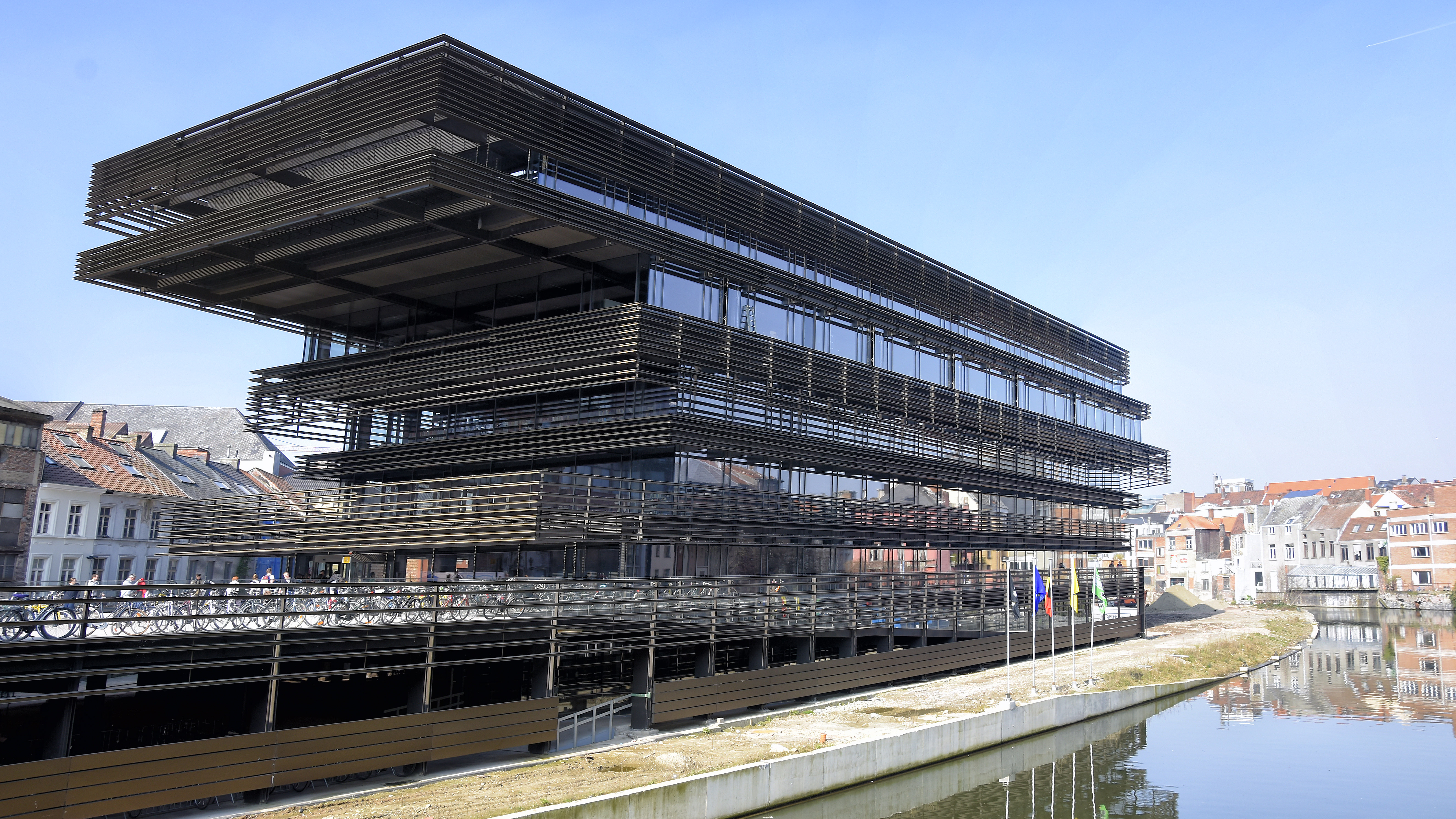 De Krook - nieuwe stadsbibliotheek in Gent, België